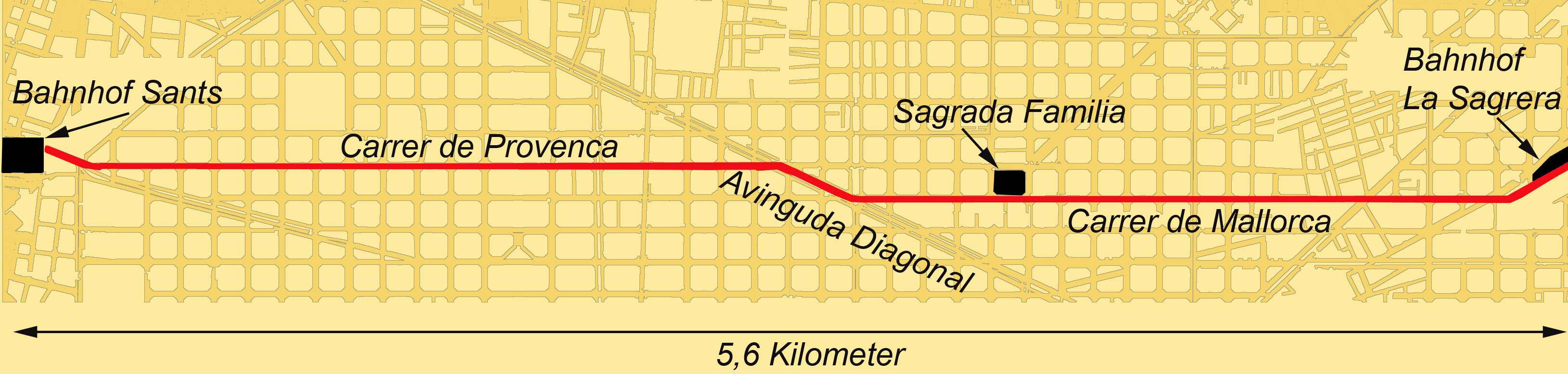 Verlauf des Provença-Tunnels in Barcelona zwischen den Bahnhöfen Sants und La Sagrera